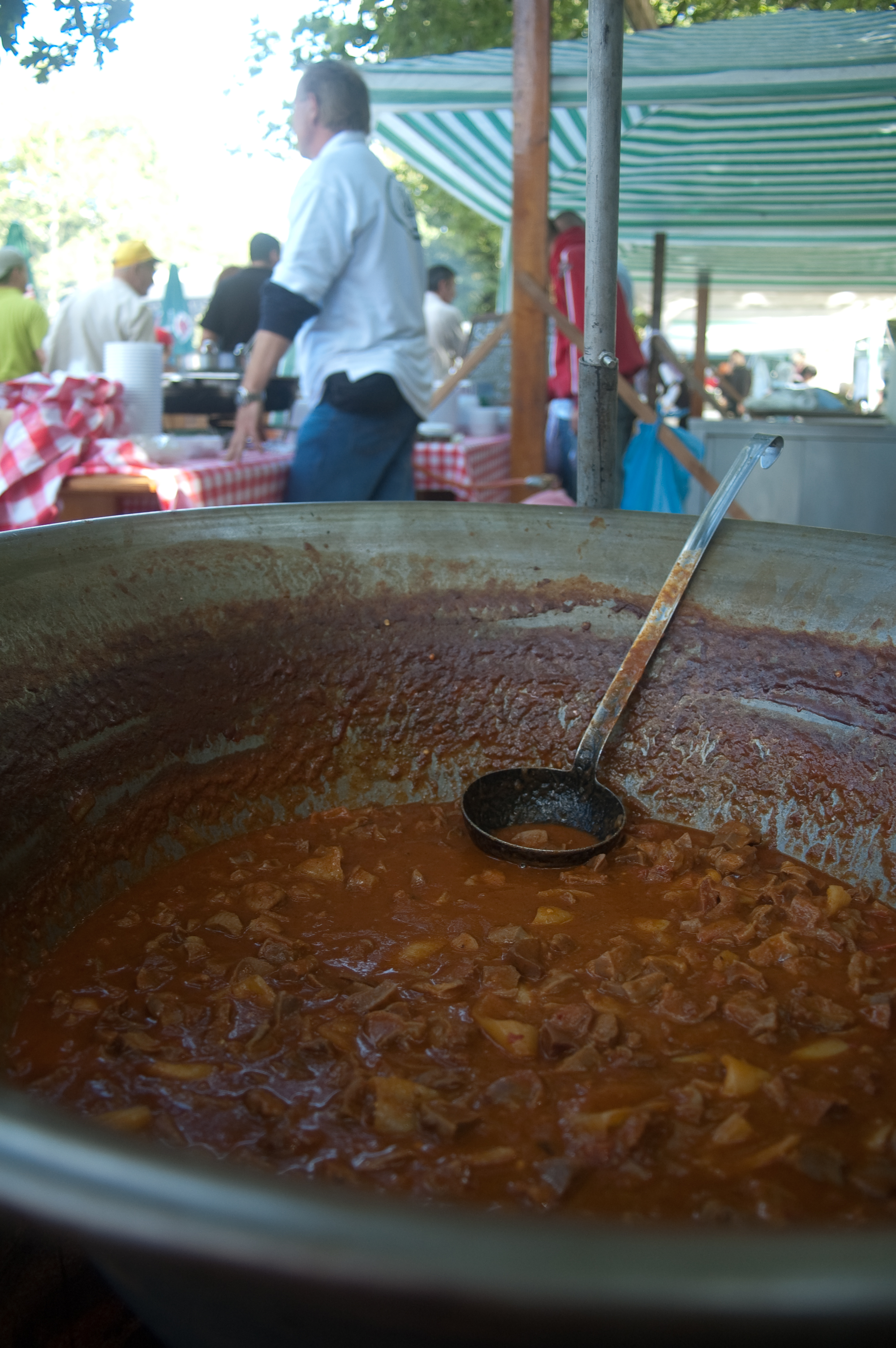 Pörkölt bográcsban